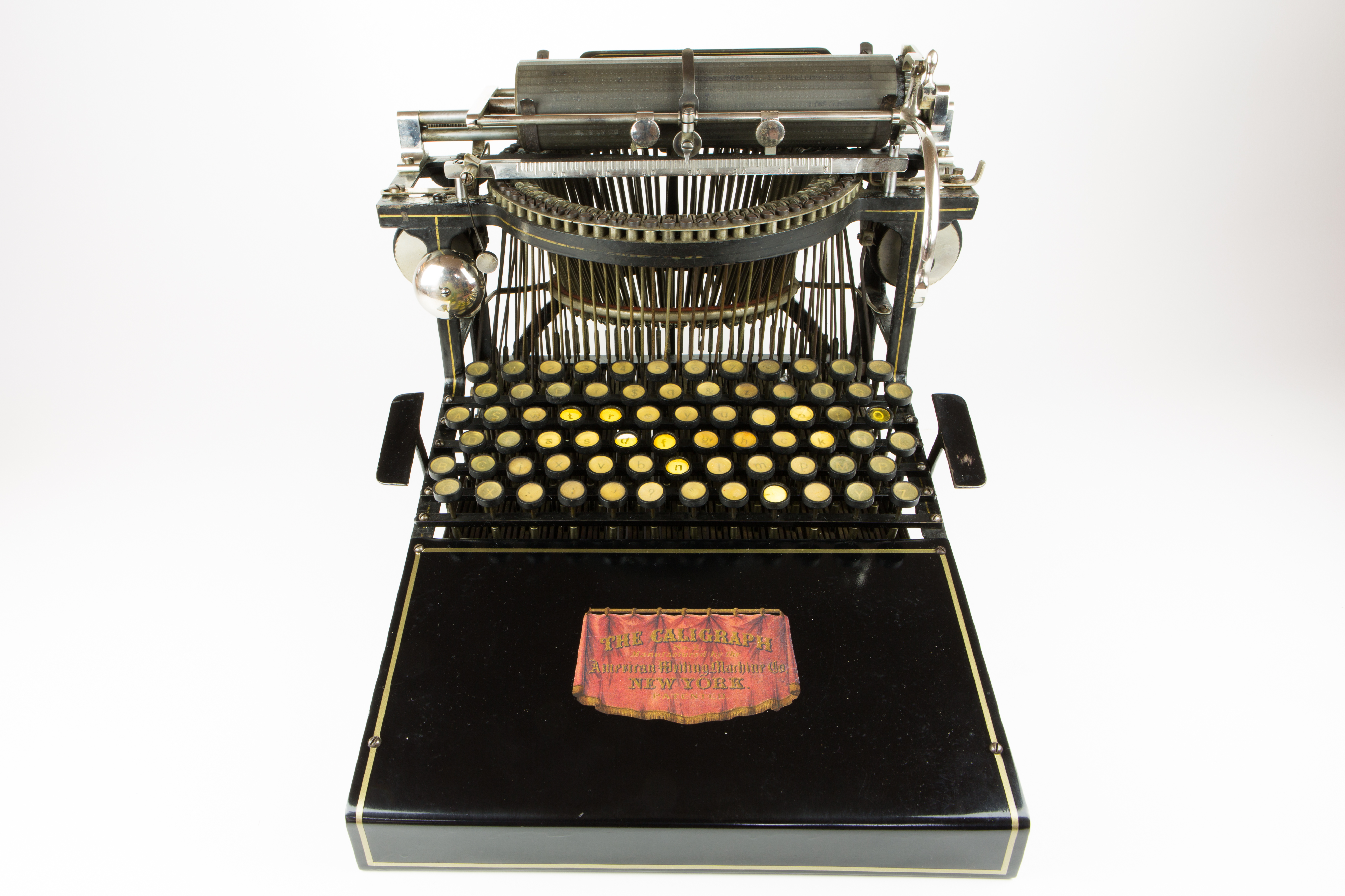 Machine à écrire Caligraph n°2 - fabriquée en 1889 (USA)